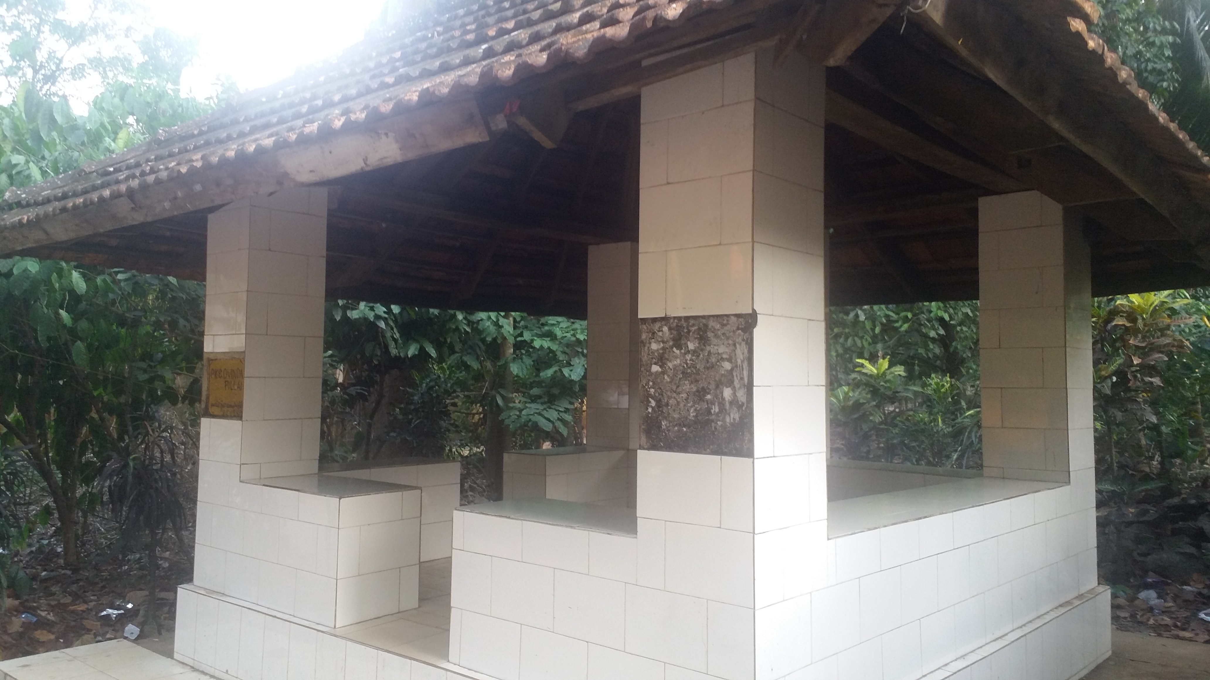 കേരളത്തിലെ കോട്ടയം ജില്ലയിൽ കഞ്ഞിരപ്പള്ളിക്ക് സമീപമുള്ള വിഴിക്കിത്തോട് ഗ്രാമത്തിൽ സ്ഥിതി ചെയ്യുന്ന വഴിയമ്പലം